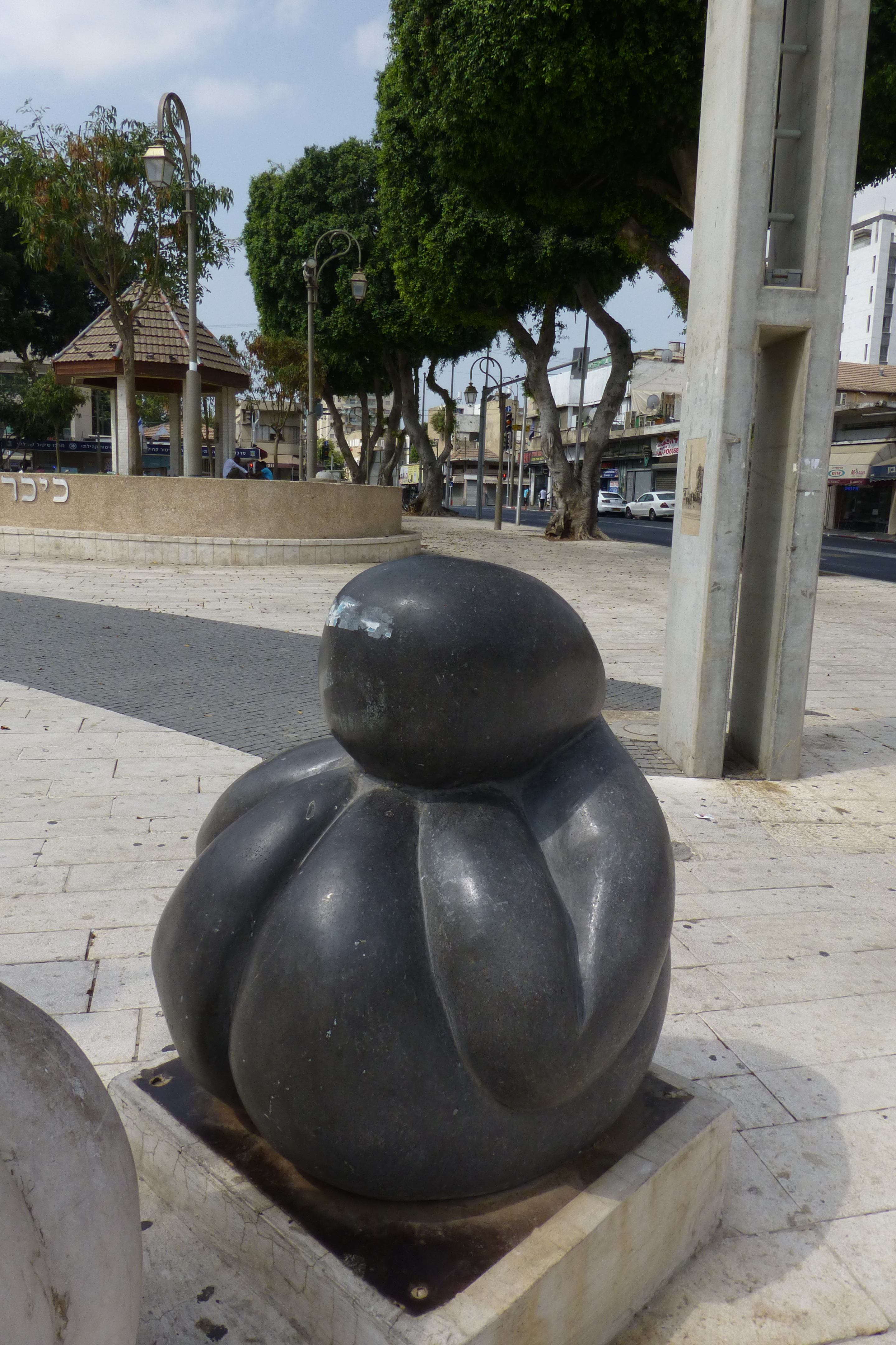 כיכר המייסדים, כיכר מרכזית בפתח תקווה, שוכנת במיקום הבתים הראשונים שנבנו בפתח תקווה בשנת 1878. כבר בימי העלייה השנייה שימשה כמקום מפגש ובילויים.